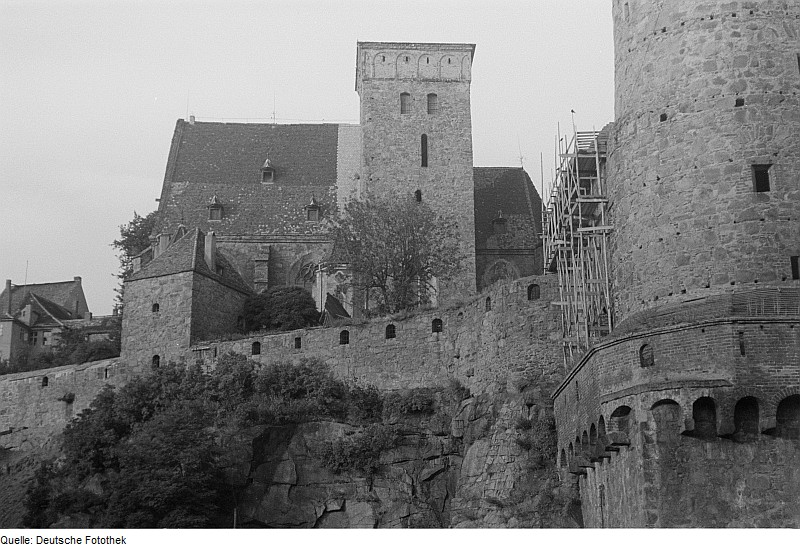 Original image description from the Deutsche FotothekMichaeliskirche